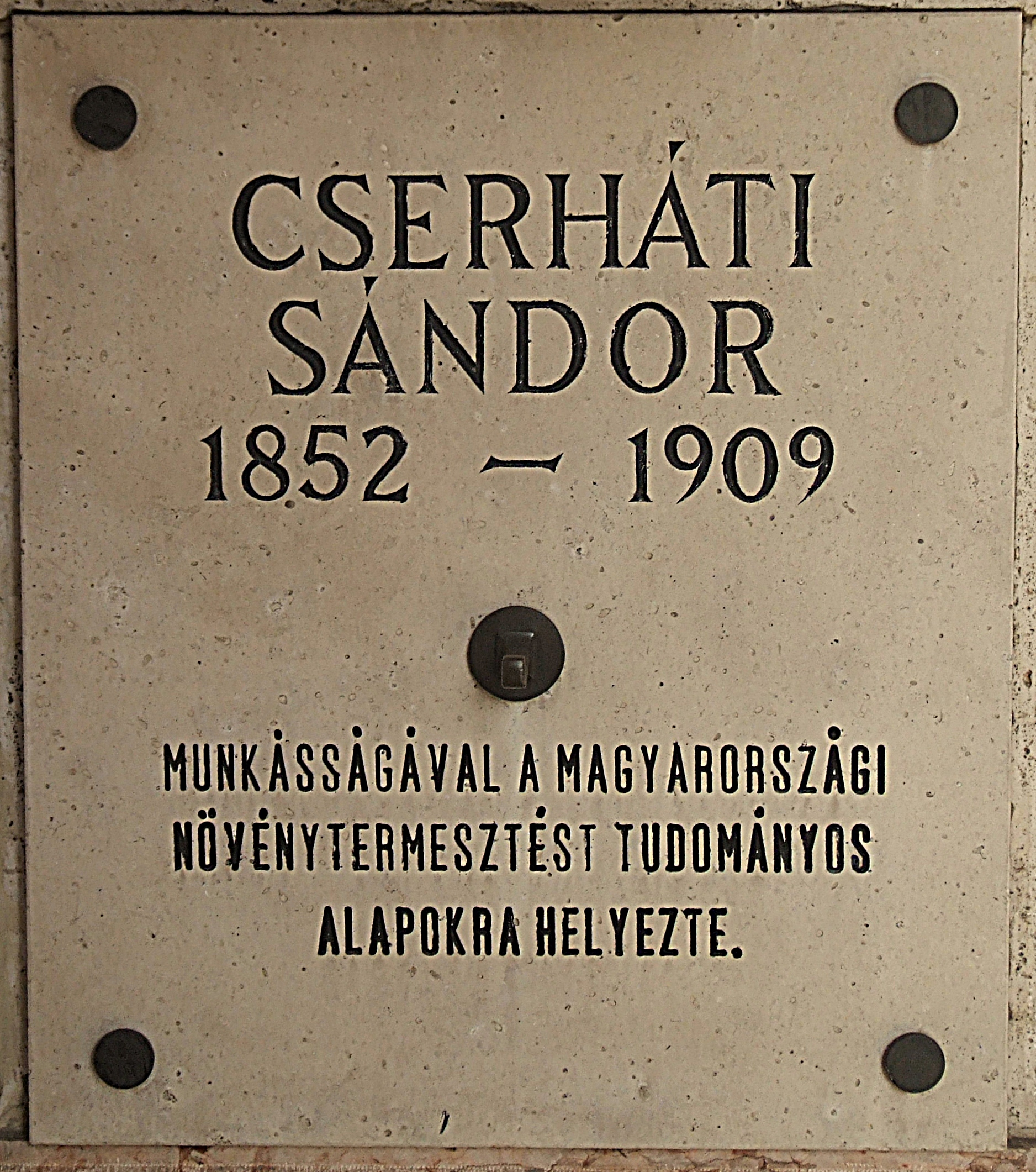 Cserháti Sándor emléktáblája a Cserháti Sándor mellszobor részlete(Budapest, Kossuth Lajos tér 11.)